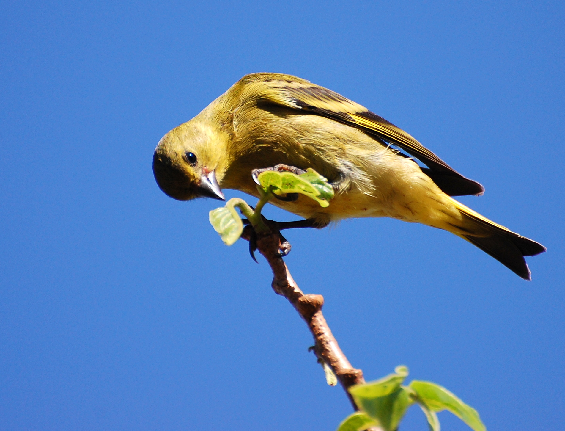 EPR - VIVEIRO DE MUDAS NATIVAS - Fazenda Vô-Vó - Piraju-SP .br